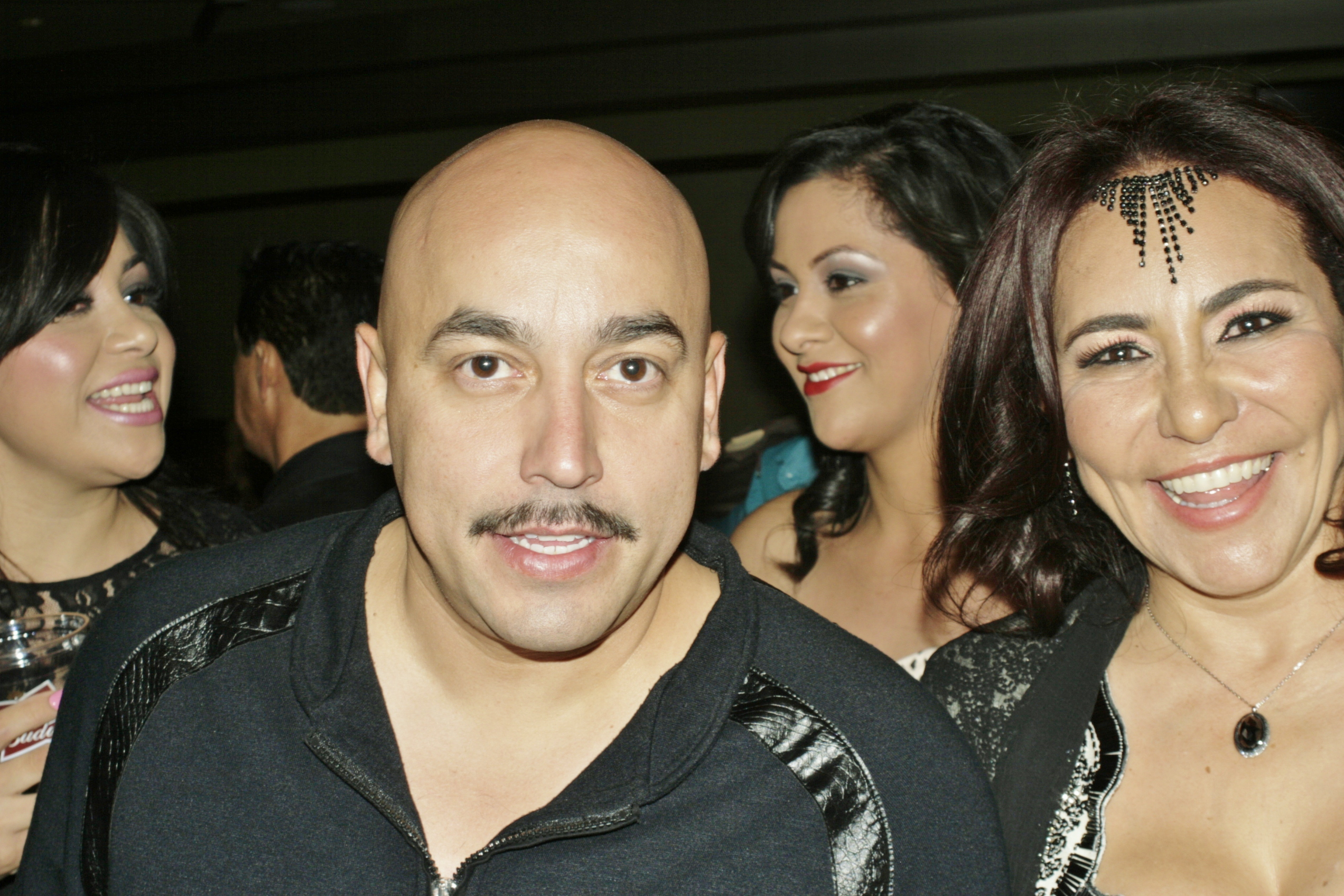 La Profesora Venus en Los Premios de la Radio 2013 Junto a Lupillo Rivera